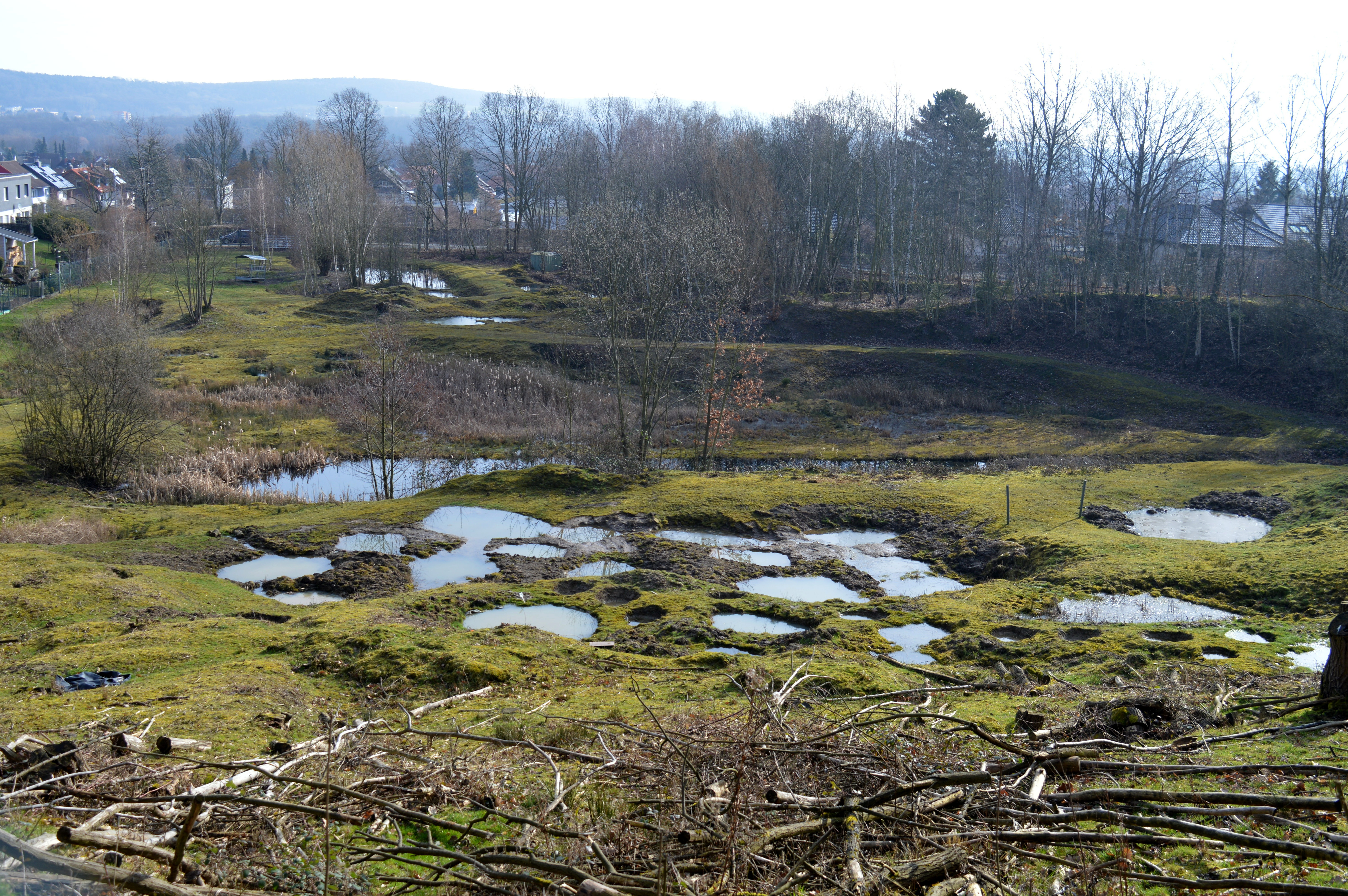 FFH Tongrube Ochtersum (31)